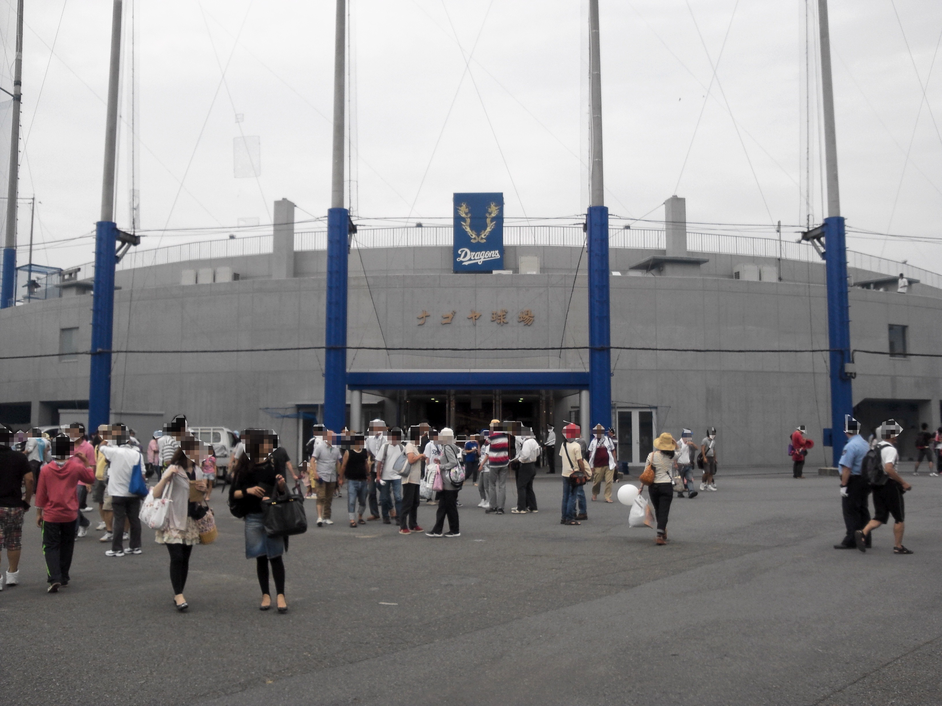 改修後のナゴヤ球場正門。 2012年6月6日撮影。人物が正面を向いている個所を処理。